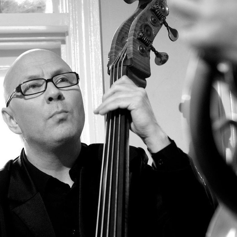 Ole Amund Gjersvik: Bass